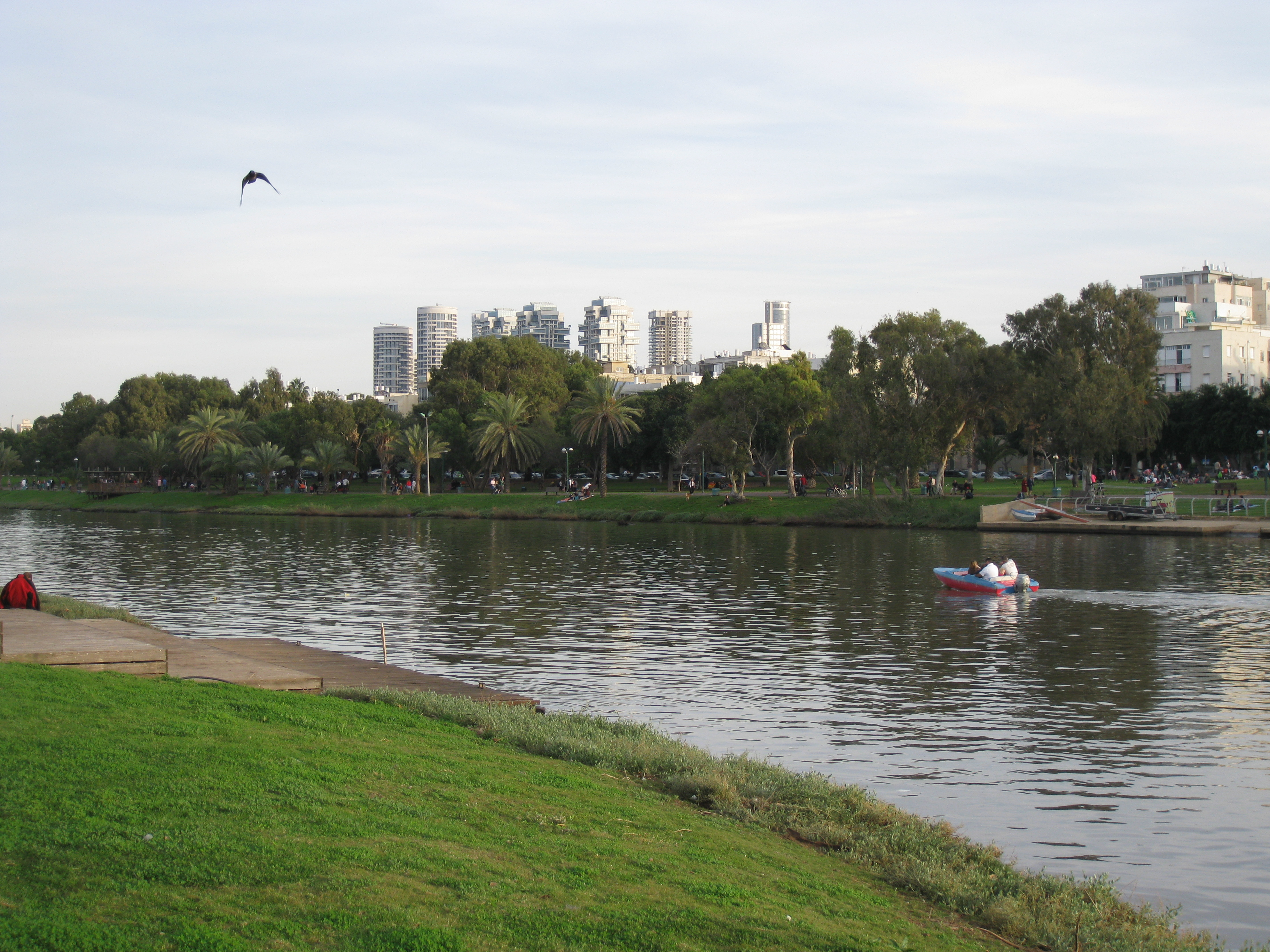 The Yarkon Park פארק הירקון